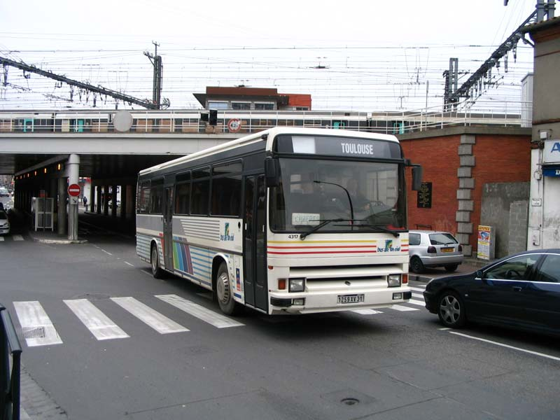 cars tracer de haute-garonne